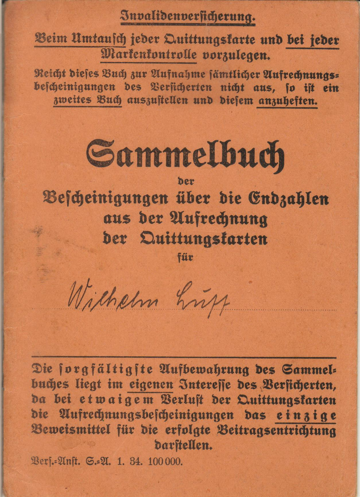 Invalidenversicherung: Sammelbuch der Bescheinigungen über die Endzahlen aus der Aufrechnung der Quittungskarten für ..... Deutschland um 1920, Aussenhülle